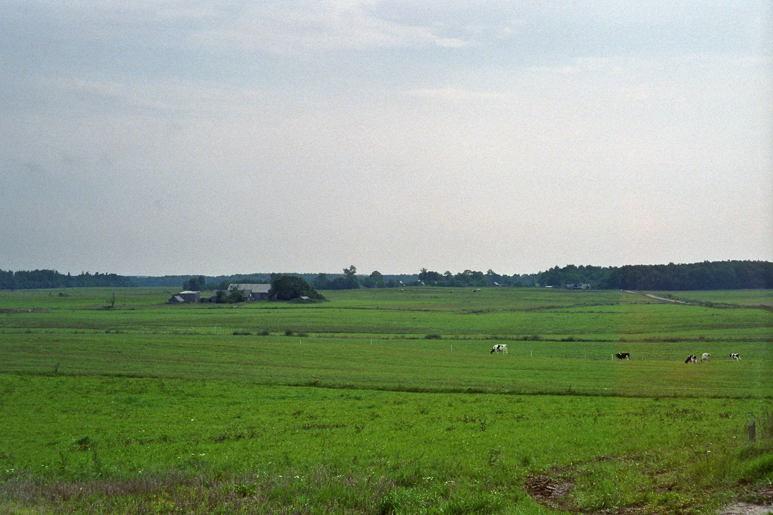 Landsitz der Familie Brennstein Puke (heute lit. Puokė)